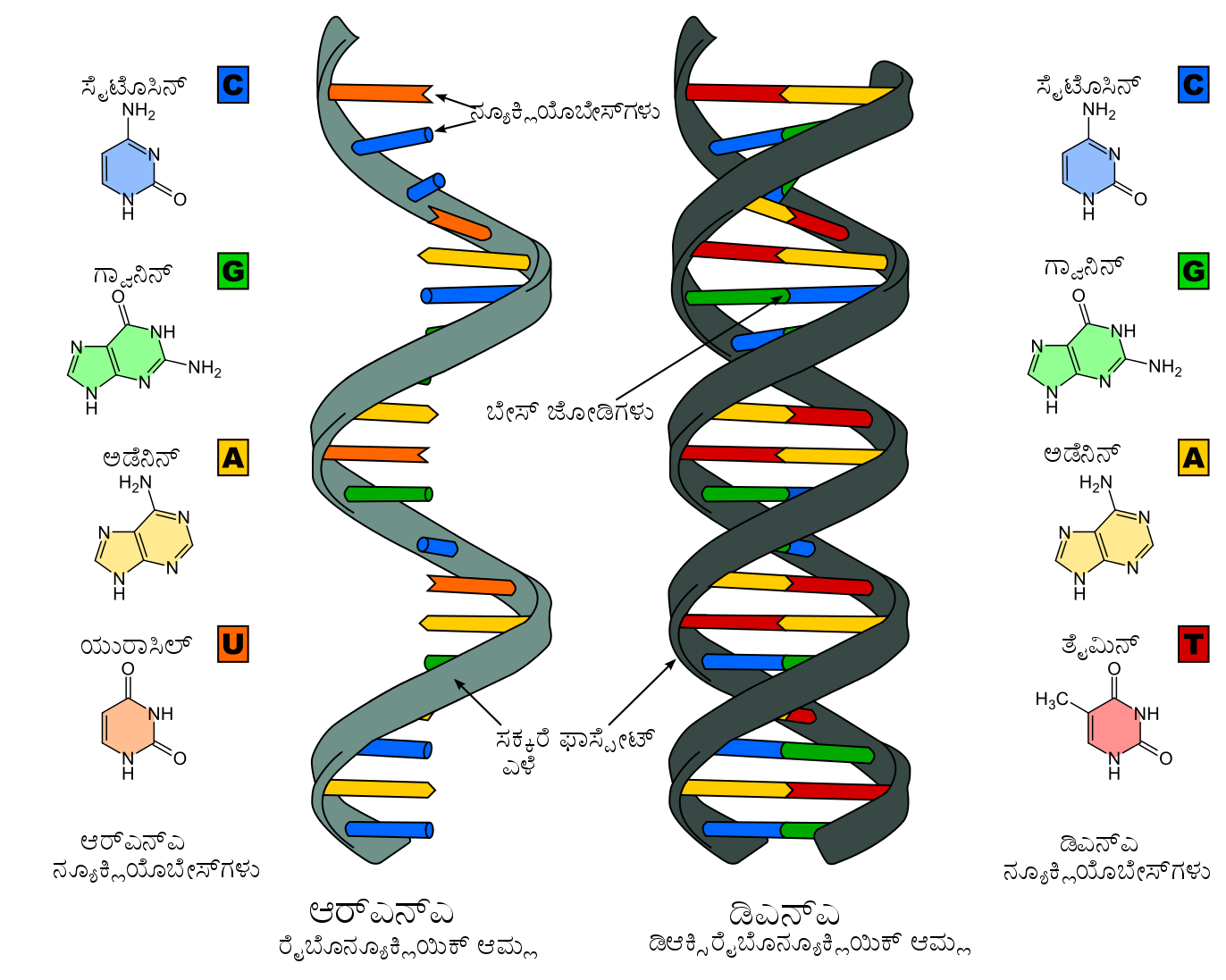 ಕನ್ನಡ: ಎರಡು ಪ್ರಮುಖ ನ್ಯೂಕ್ಲಿಯಿಕ್ ಆಮ್ಲಗಳ ನಡುವೆ ಹೋಲಿಕೆ: ಆರ್‌ಎನ್ಎ (ಎಡ) ಮತ್ತು ಡಿಎನ್ಎ (ಬಲ), ಎರಡೂ ಬಳಸುವ ಎಳೆ ಮತ್ತು ನ್ಯೂಕ್ಲಿಯೊಬೇಸ್‌ಗಳು